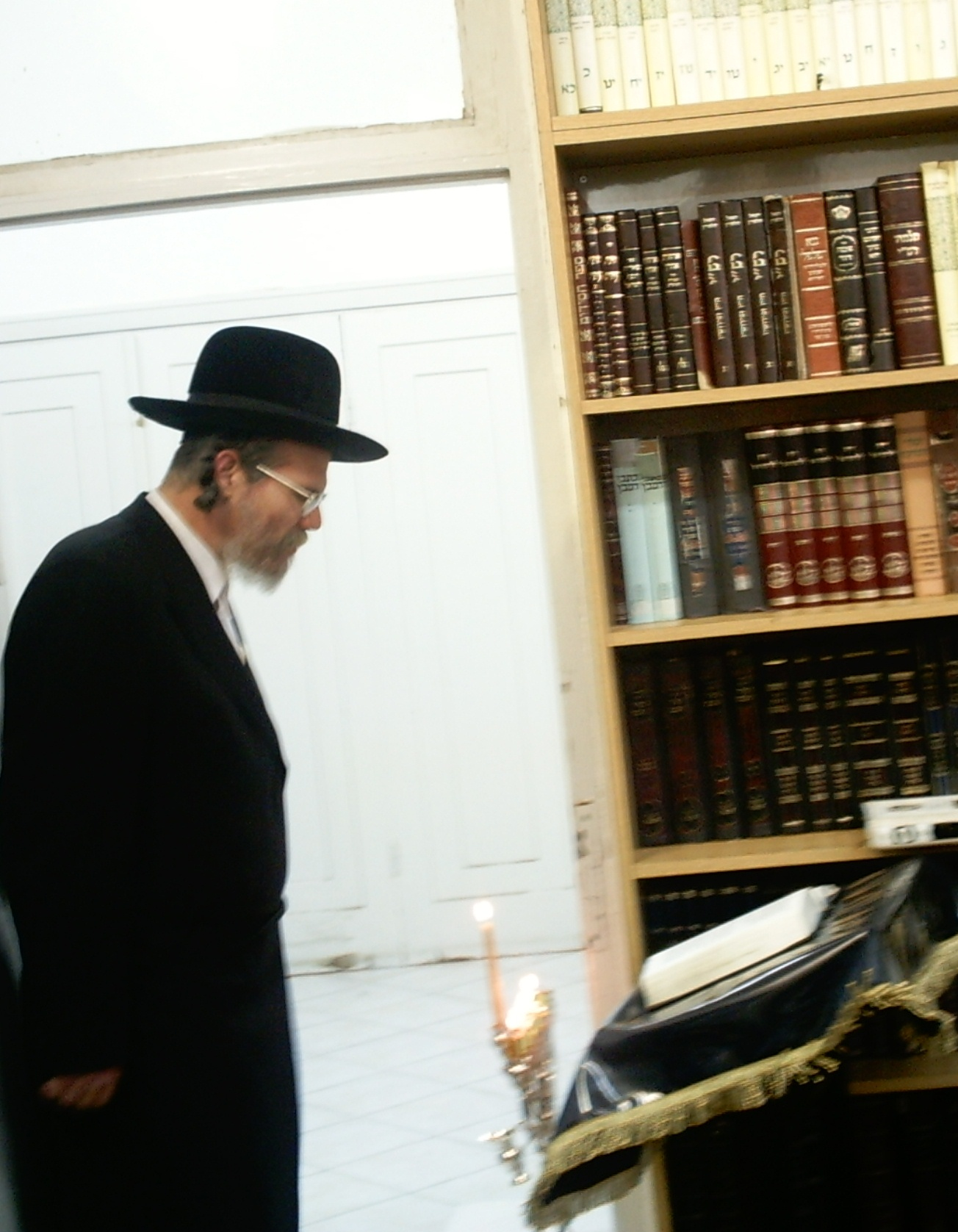 Rabbi Shmuel Bornsztain (II).